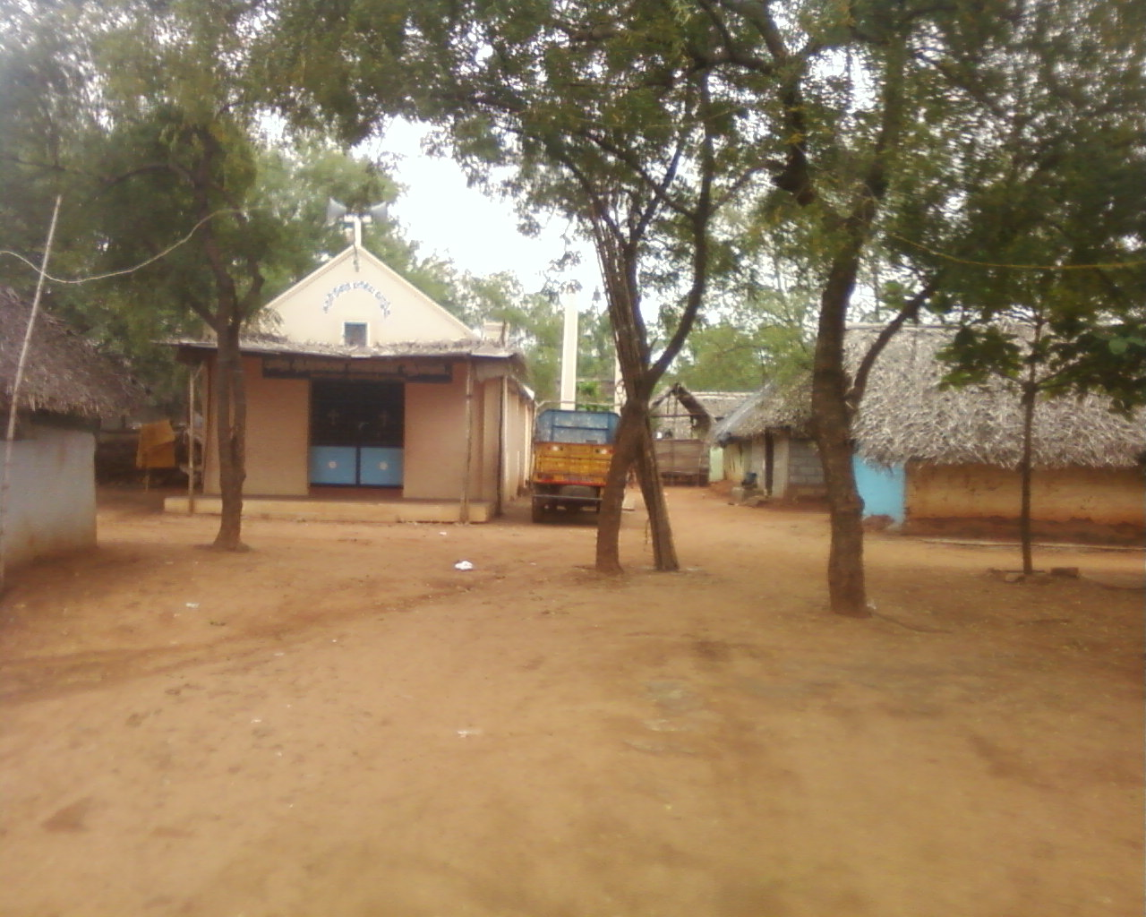 இந்தியாவில் இலங்கைத் தமிழர்கள் முகாம்